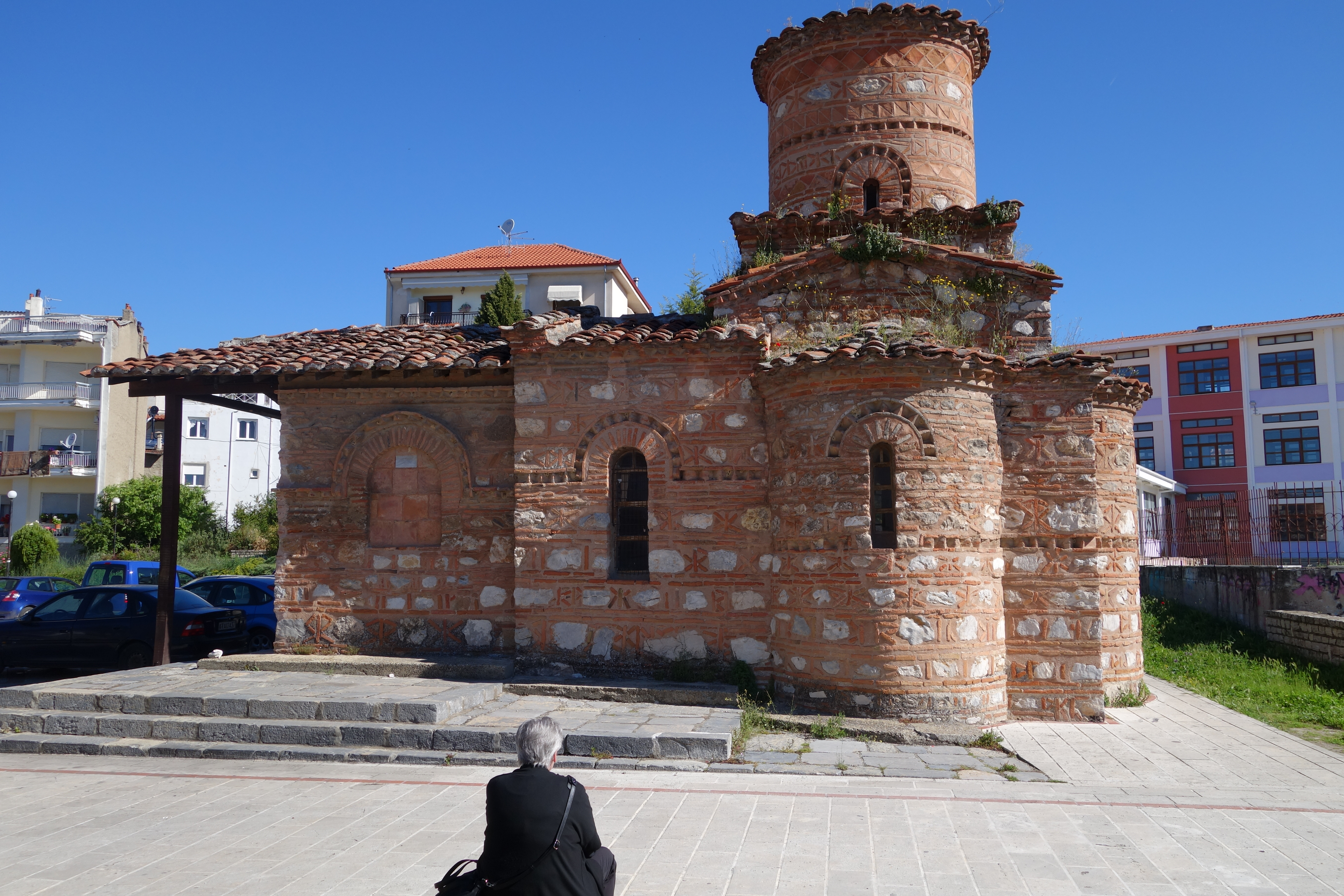 Kastoria, Griechenland. Byzantinische Kirche des Panagia Koumpelidiki.